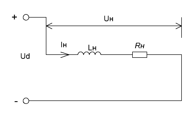 схема протікання струм